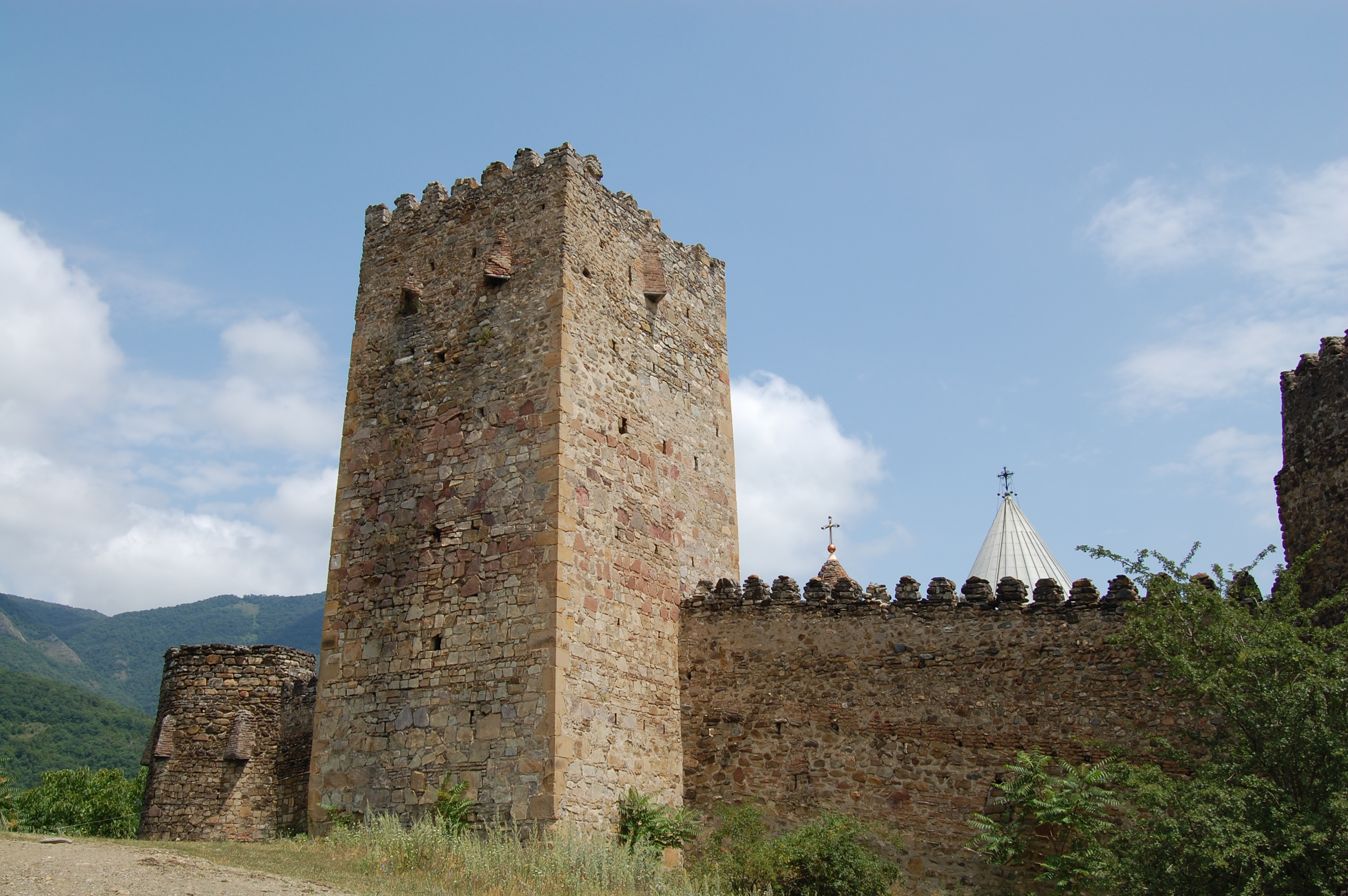 Ananuri Georgia - Sakartvelo